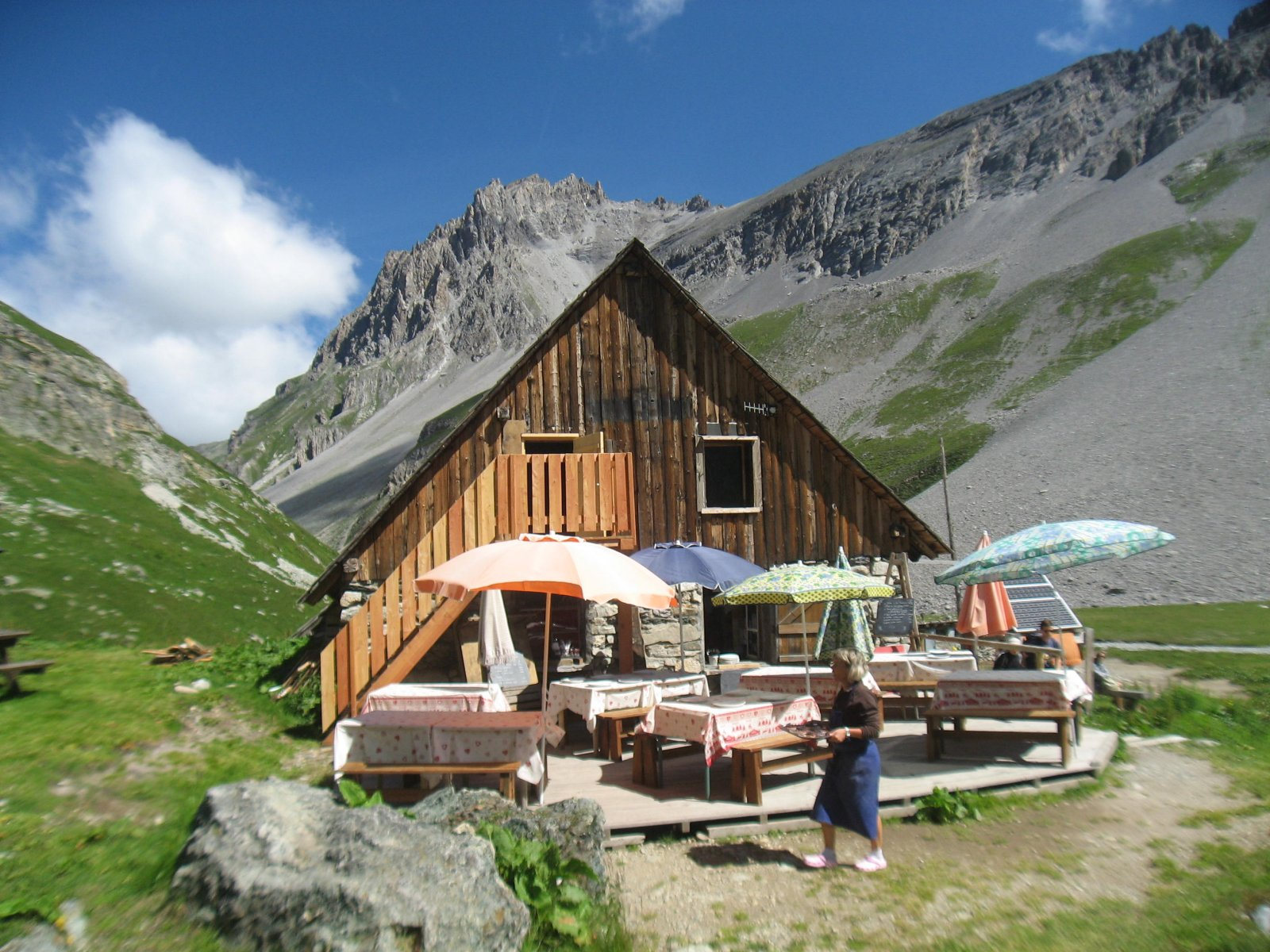 Vue du refuge du Saut (2127m), a derrière l'aiguille de Fruit (3048m)